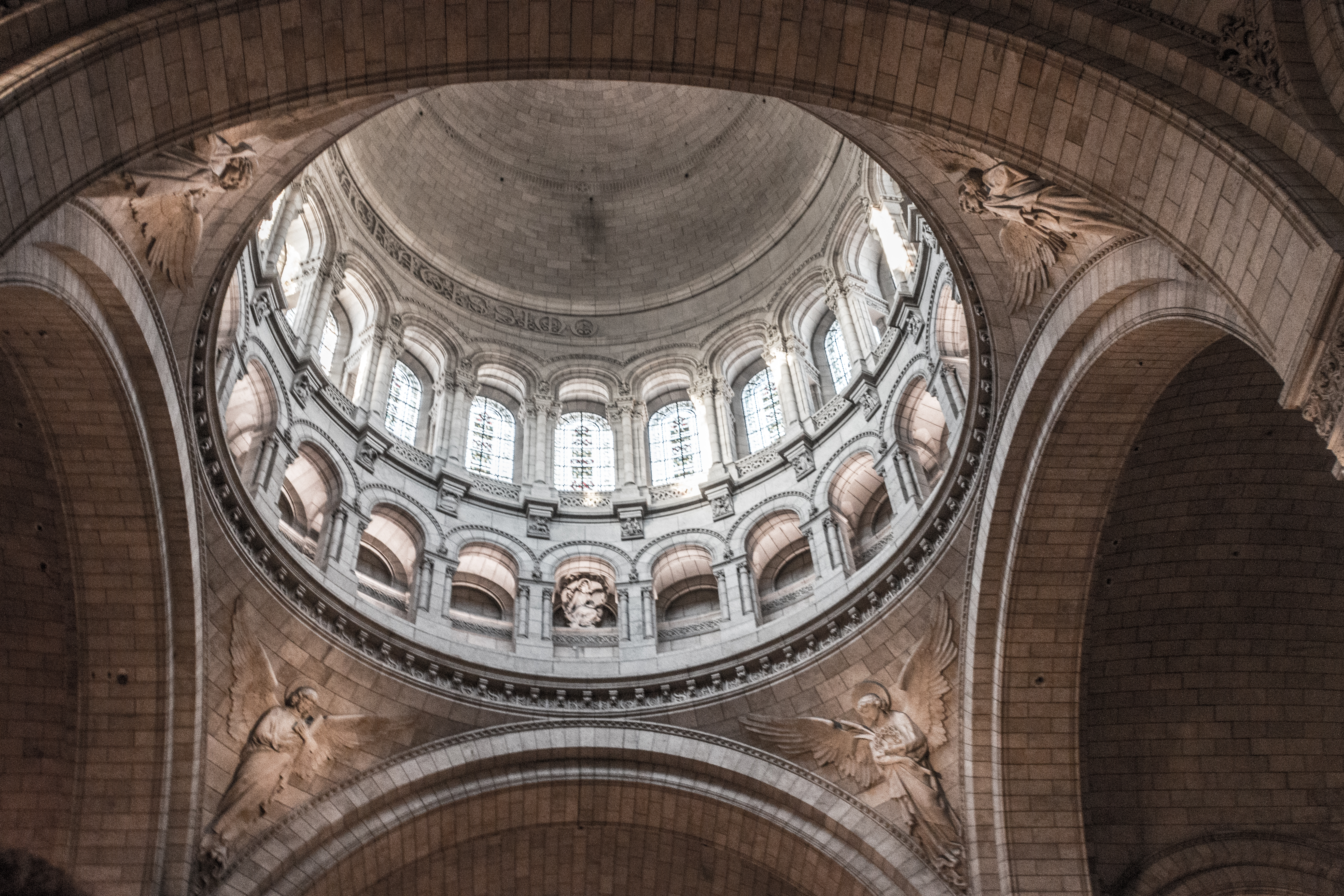 Basílica del Sagrado Corazón (París) de Montmartre